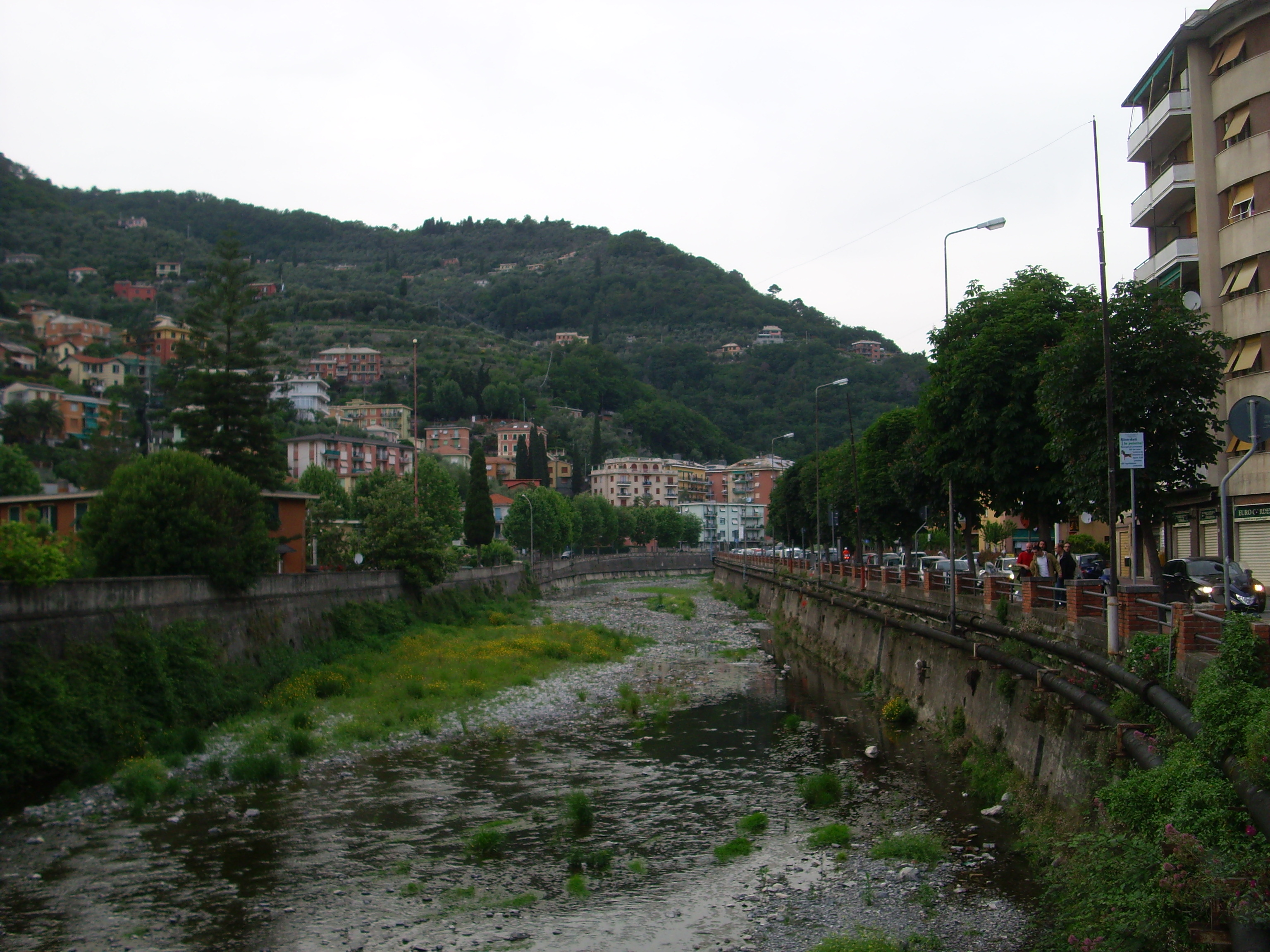 Il torrente Recco, nell'omonima località